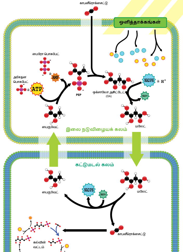 C4 கார்பன் பதித்தலின் எளிய விளக்கப்படம்